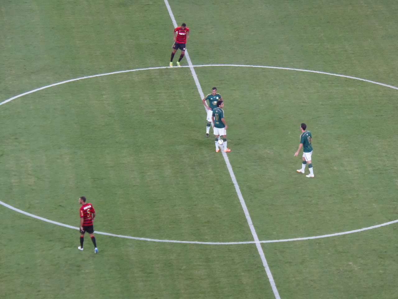 Equipes do Palmeiras e do Sport pouco antes de partida realizada no Allianz Parque, pelo Campeonato Brasileiro de 2014